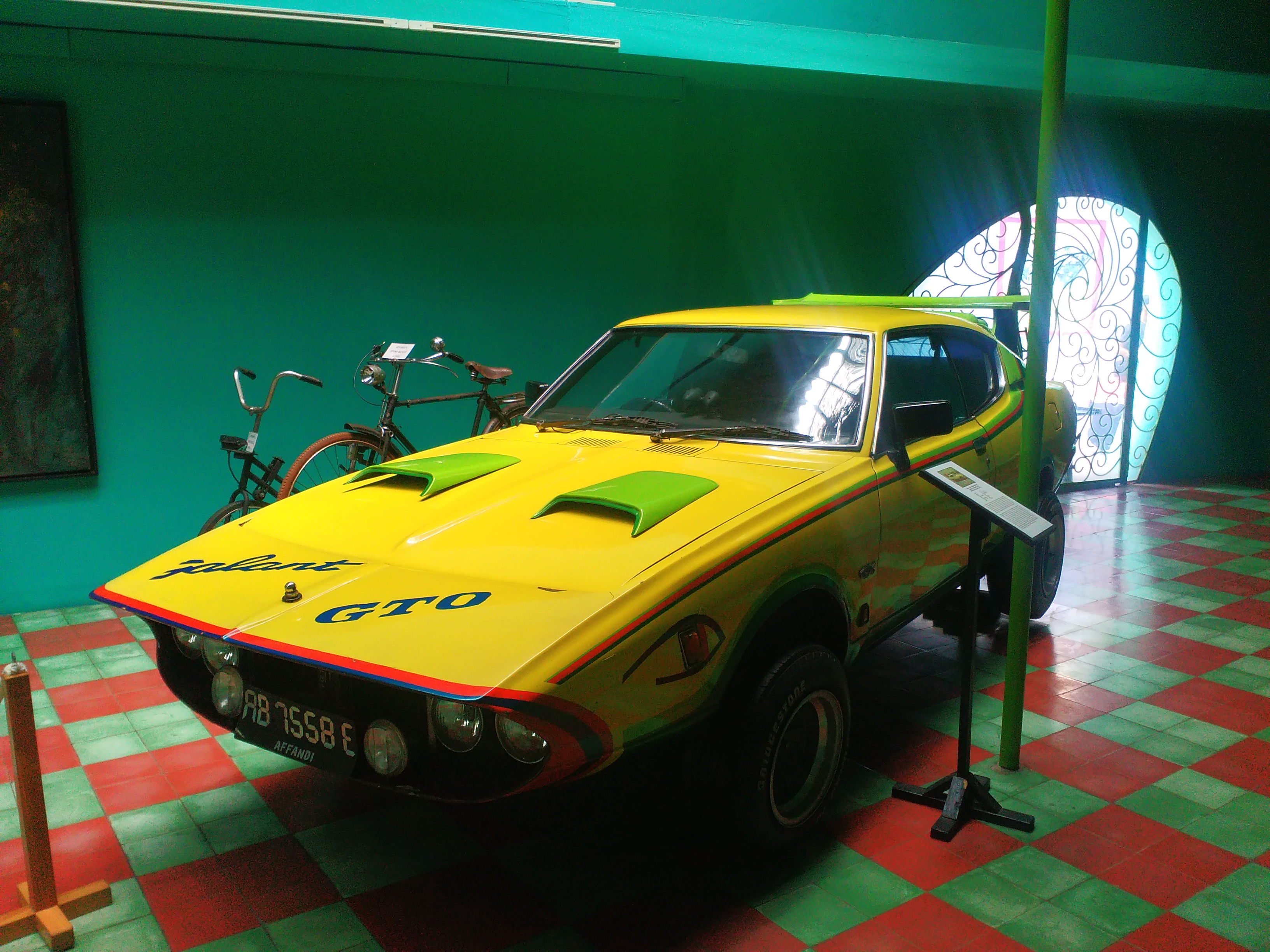 Mobil sedan GTO merupakan mobil kesayangan Affandi. Mobil ini sering digunakan oleh Affandi untuk bepergian.